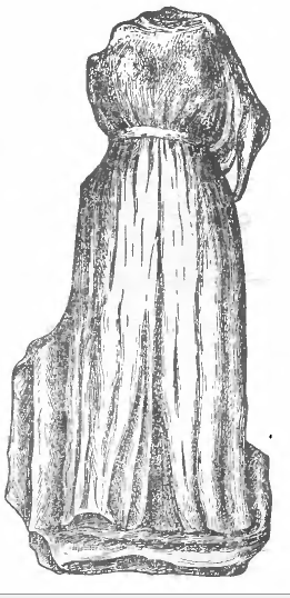 Статуя богини Астары, найдена на берегу Ахтанизовского лимана Рисунок Генриха Карла Эрнста Кёлера. Первая публикация в 1805 году.